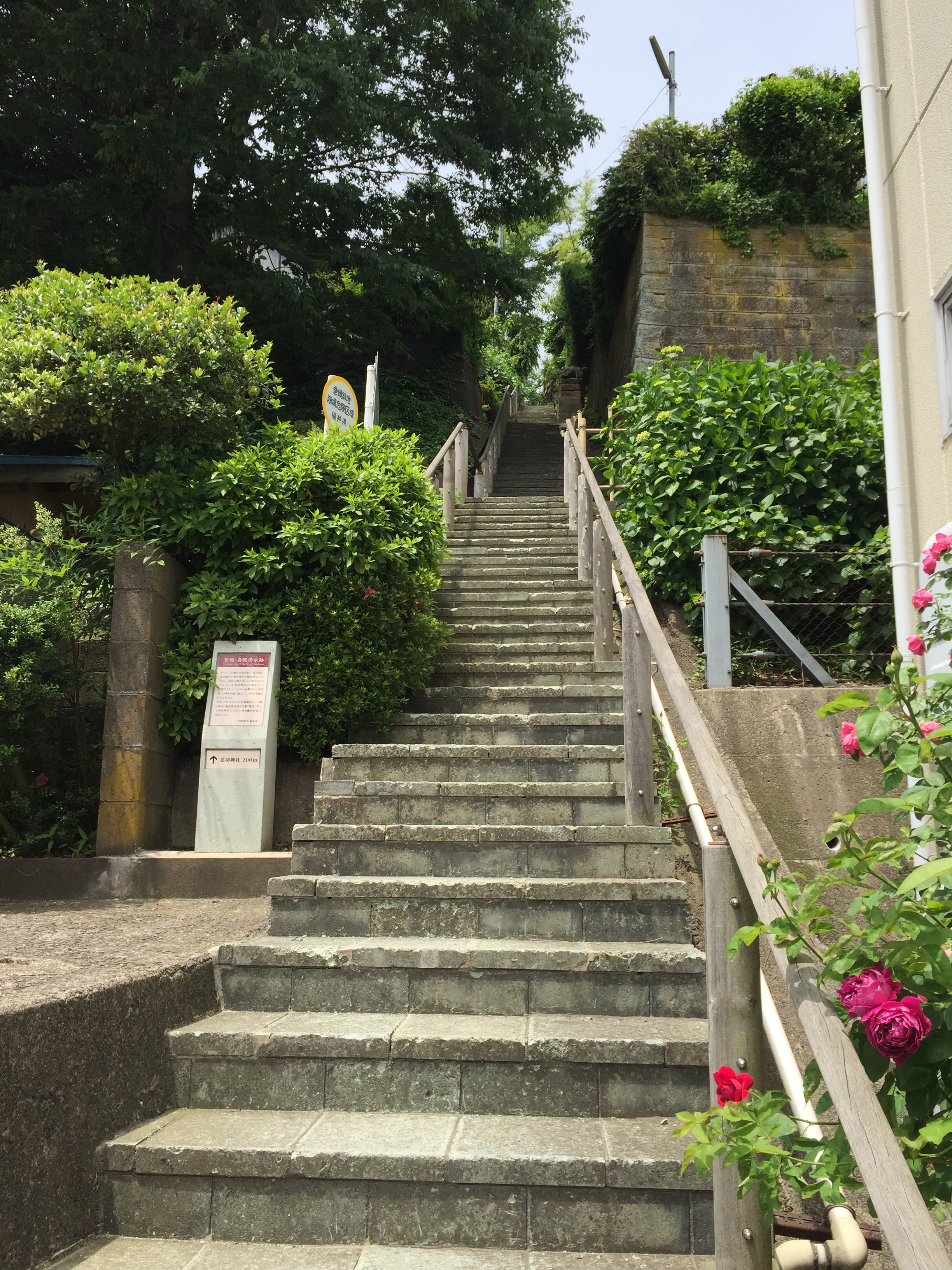 百坂(福井市）